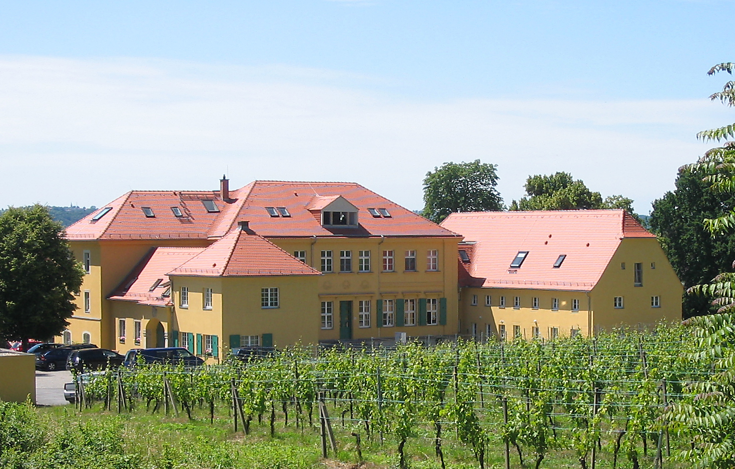 Radebeul, Gebäudegruppe des Paulsberg (Lößnitz), Innenhofansicht von Norden, links der Riemerschmid-Anbau